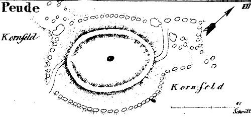 Pöide maalinn